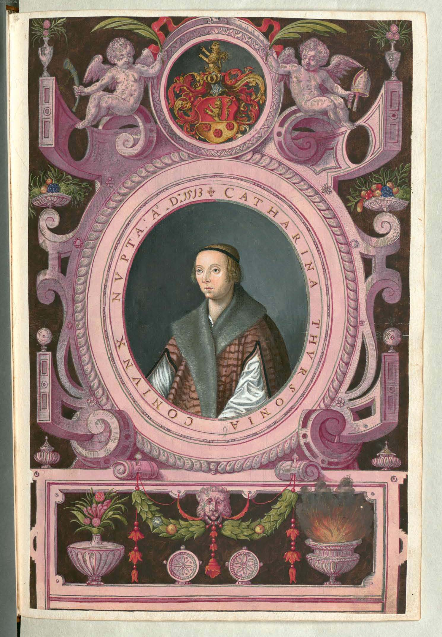 Fuggerorum et Fuggerarum imagines wurde 1588 von Philipp Eduard Fugger beim Kupferstecher Dominicus Custos in Auftrag gegeben. Das Werk enthält mit Aquarell- und Gouache-Farbe kolorierte Stiche der Mitglieder der Fugger von der Lilie. Der Druck von 1618 stellt das einzige kolorierte Exemplar dar. Katharina Thurzo von Bethlenfalva (1488-1535), Ehefrau Raymund Fuggers